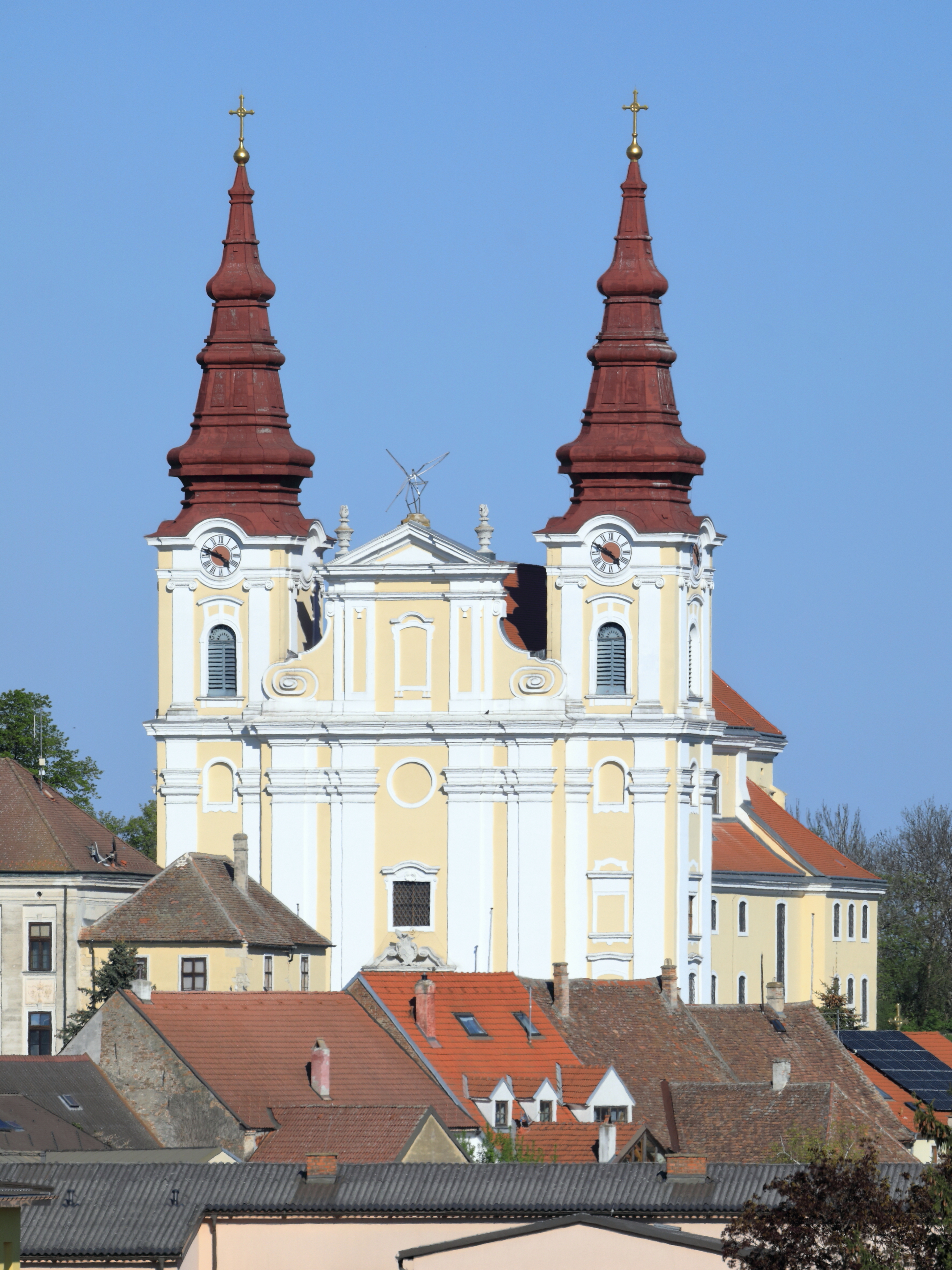 Fernansicht der ortsbildbeherrschenden röm.-kath. Pfarrkirche hl. Georg in der niederösterreichischen Marktgemeinde Wullersdorf.Eine mächtige Barockkirche aus der 1. Hälfte des 18. Jahrhunderts, wobei beim Chor teilweise Bausubstanz von der Vorgängerkirche miteingebunden wurde. Ursprünglich hatte die Kirche nordseitig den Turm der Vorgängerkirche. Beim großen Brand von 1822 wurde er schwer beschädigt und musste dann 1858 endgültig abtragen werden. Als Ersatz wurden 1864/65 nach Plänen von Franz Schlierholz die zwei Fassadentürme errichtet.